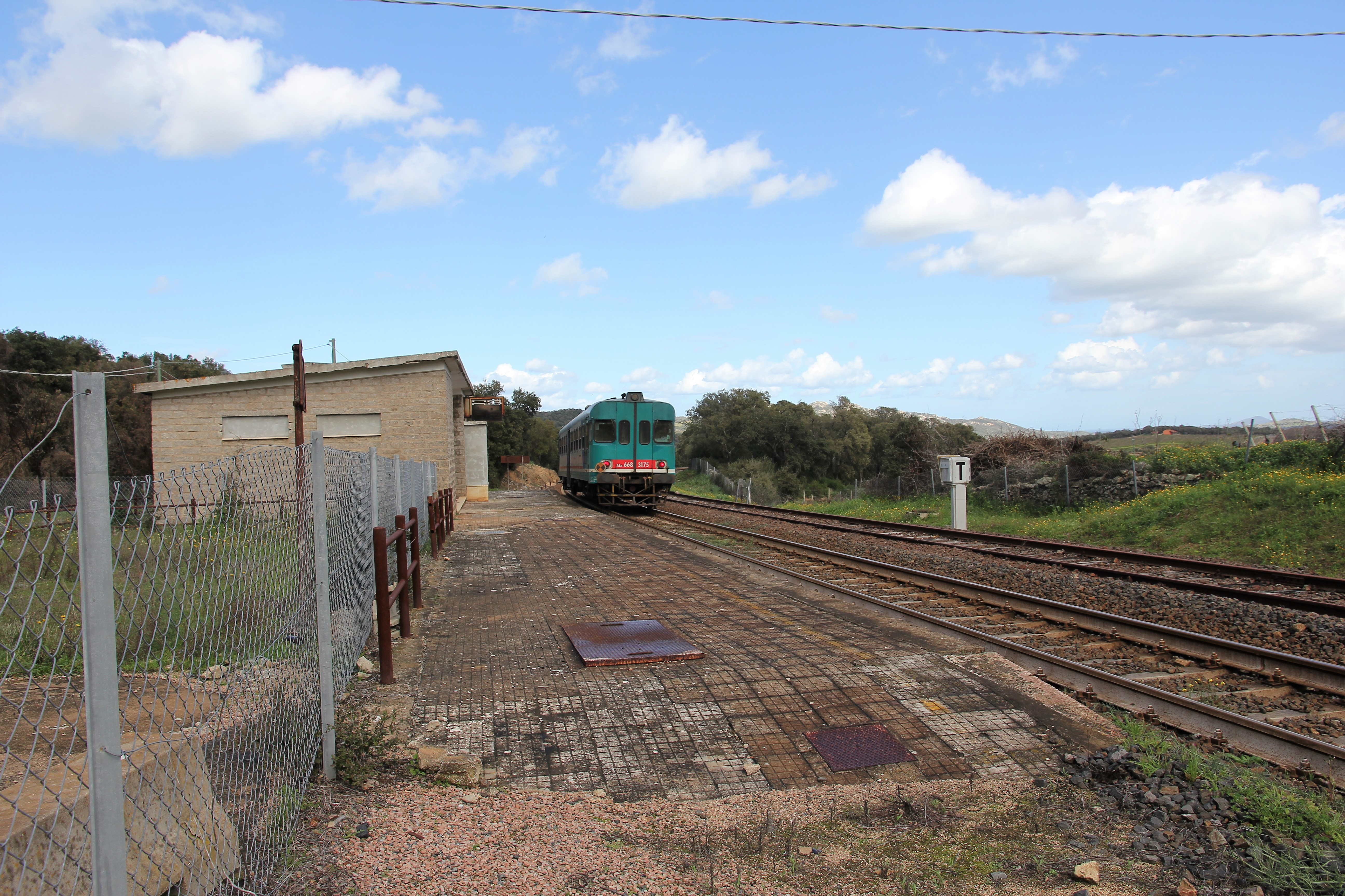 Monti, stazione ferroviaria di Chirialza